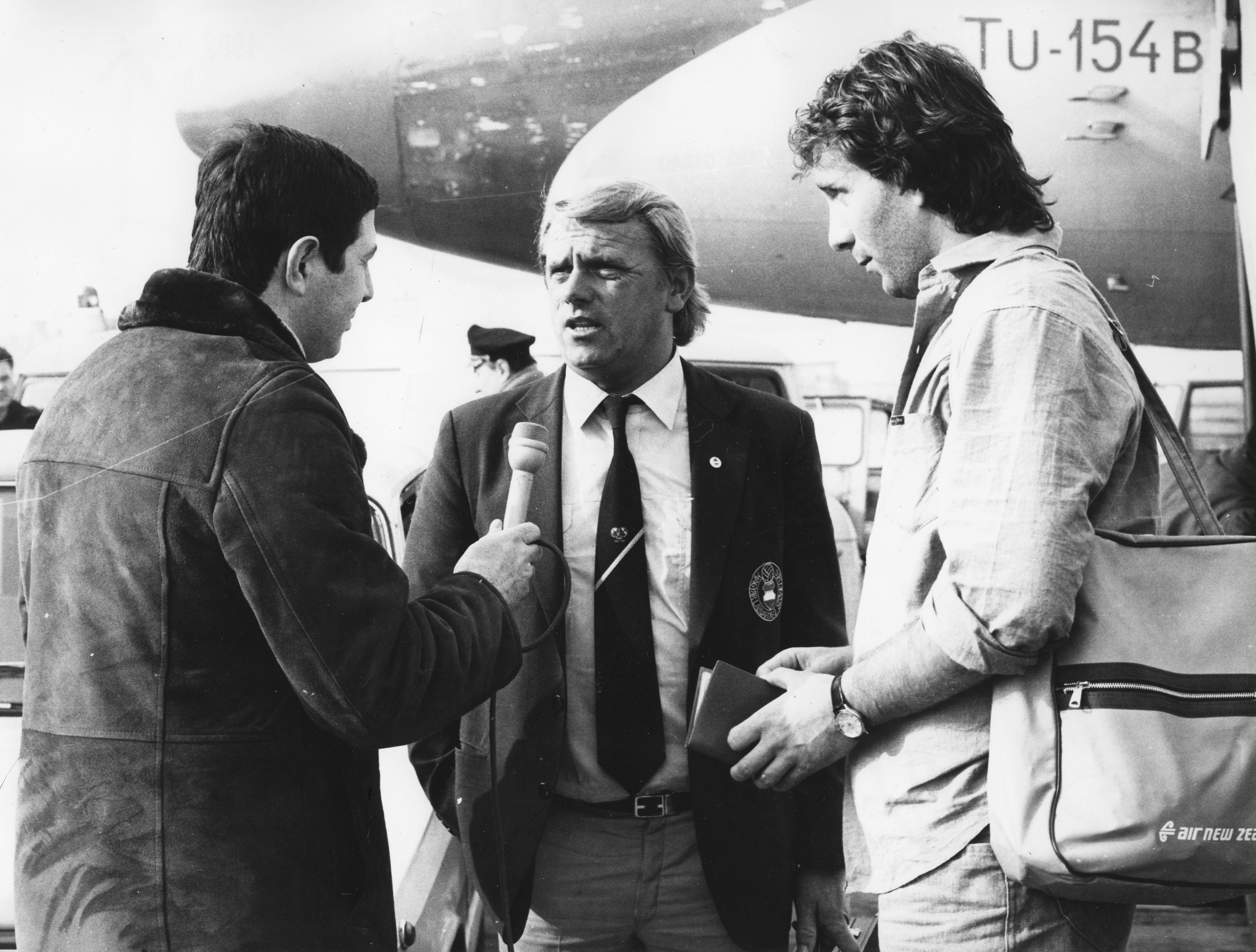 Ferihegyi repülőtér, Bánó András TV riporter Mészöly Kálmán labdarúgó szövetségi kapitánnyal és Nyilasi Tiborral készít riportot a TV Híradónak.